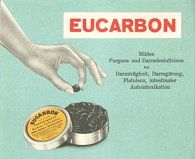 Eucarbon, alte Werbung